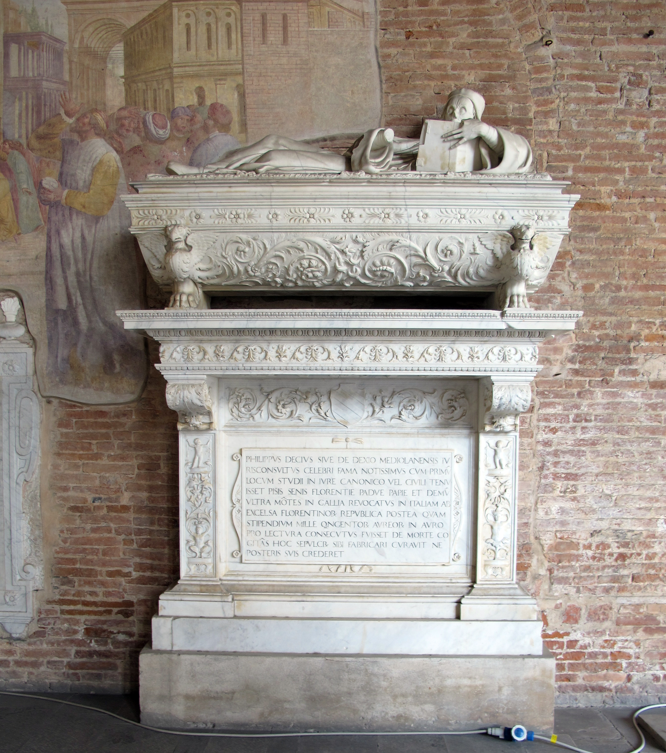 Monumento funebre del giureconsulto Filippo Decio (m. 1535) di Stagio Stagi. Camposanto di Pisa.